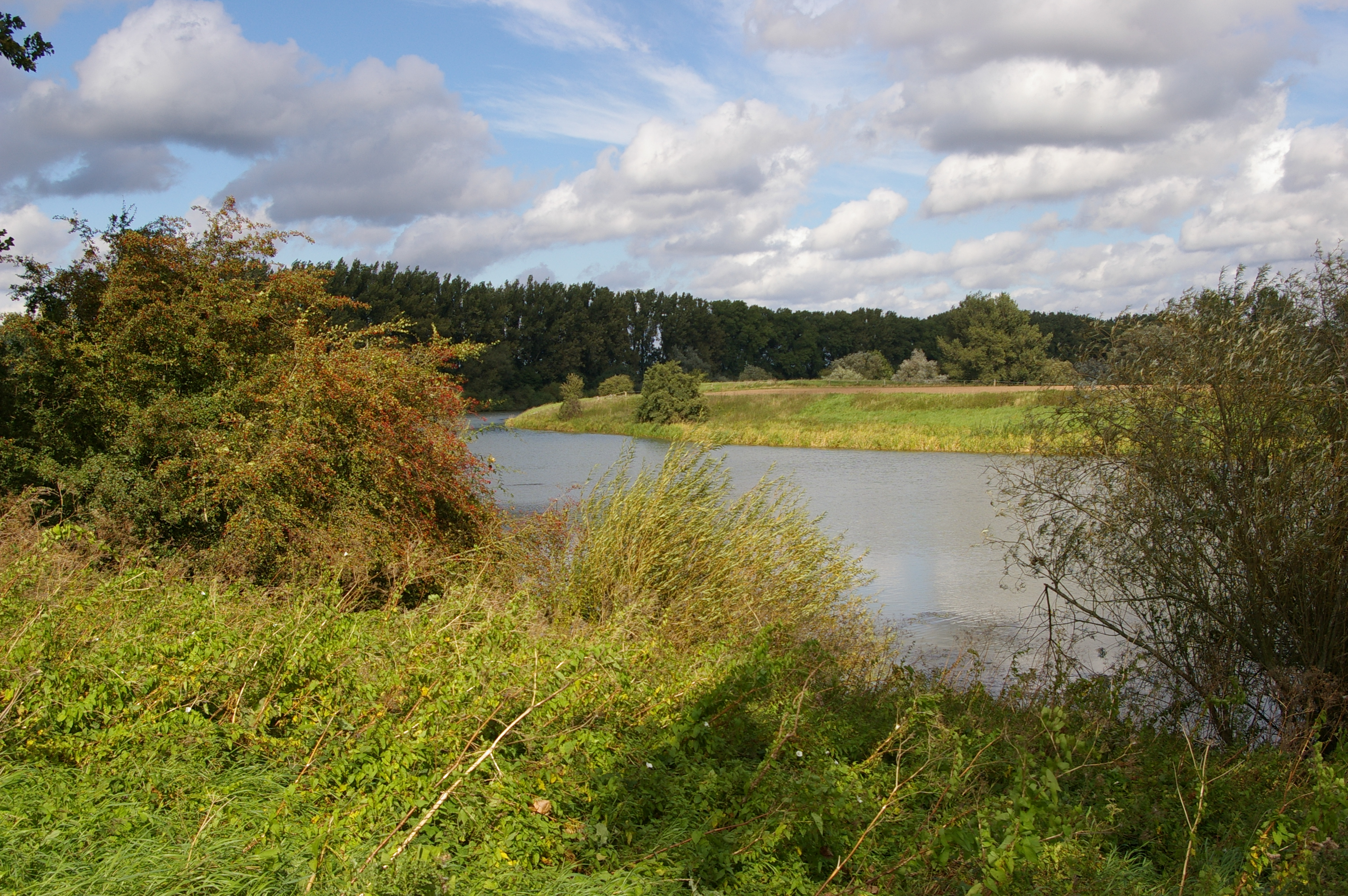 Die Wellier Schleife bei Wellie